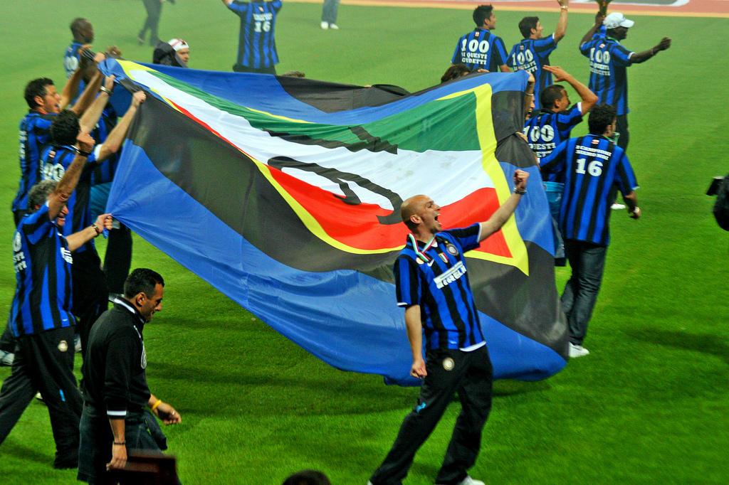 Festeggiamenti allo stadio Meazza per la conquista da parte dell'Inter dello scudetto 2007-2008